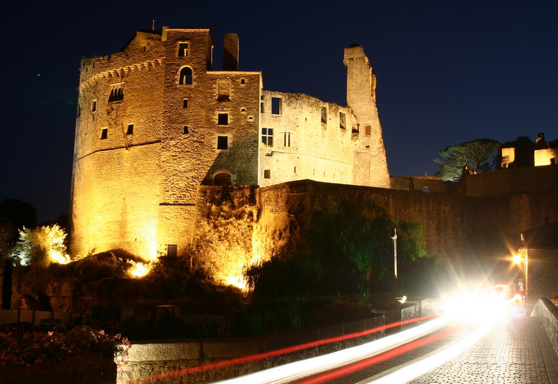 Château de Clisson, vu de nuit.